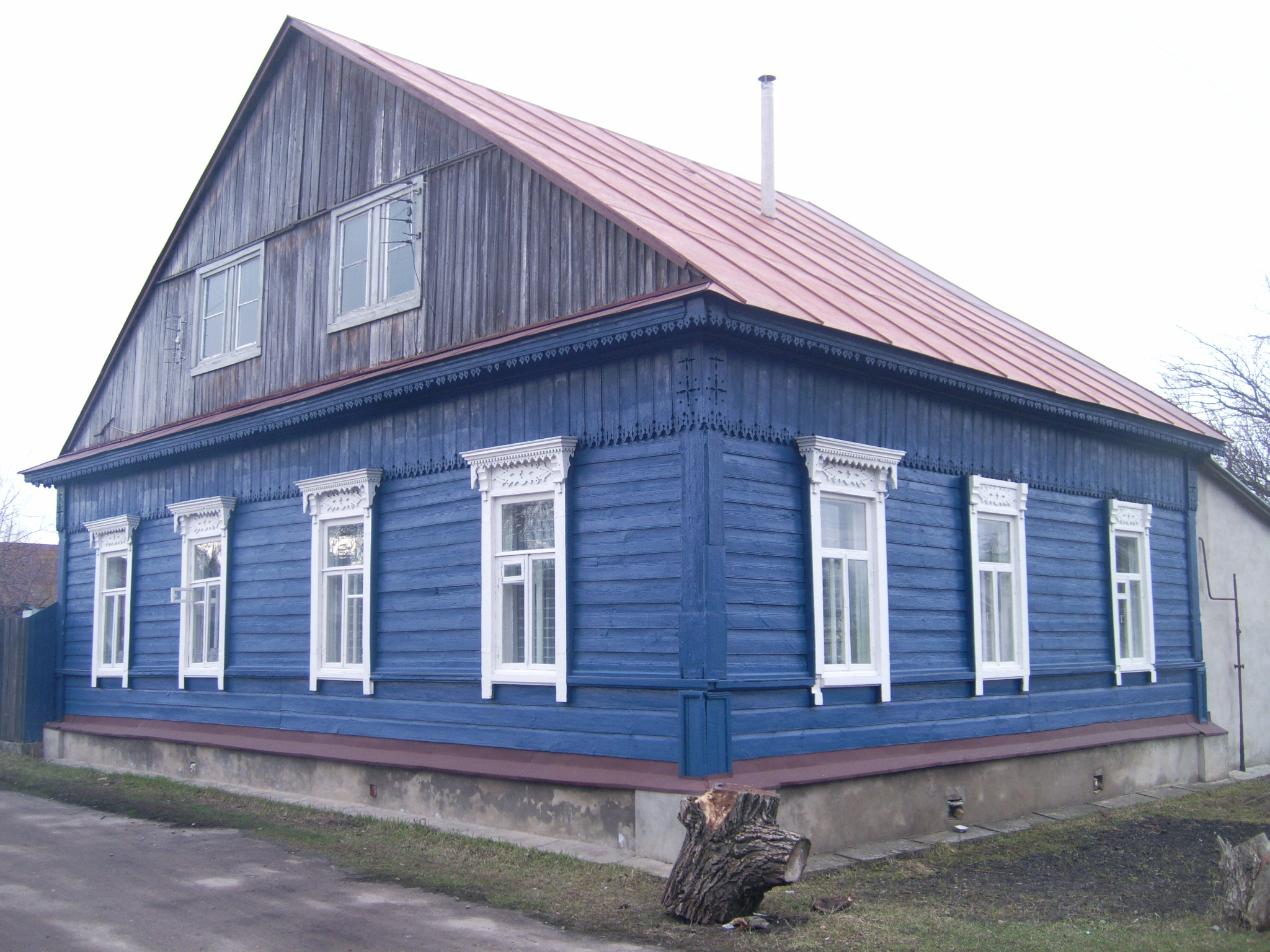 Козелець. Реставрований будиночок у історичній частині містечка біля собору.